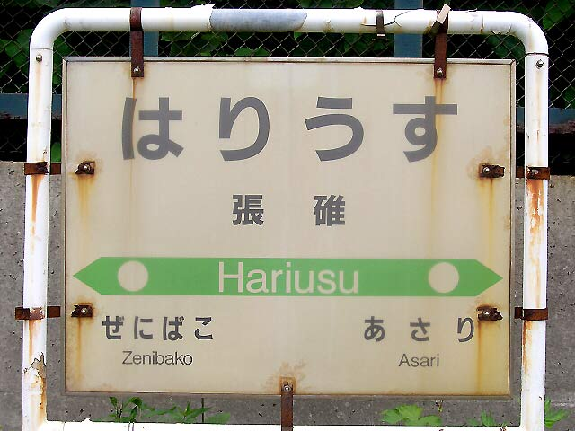 駅名板